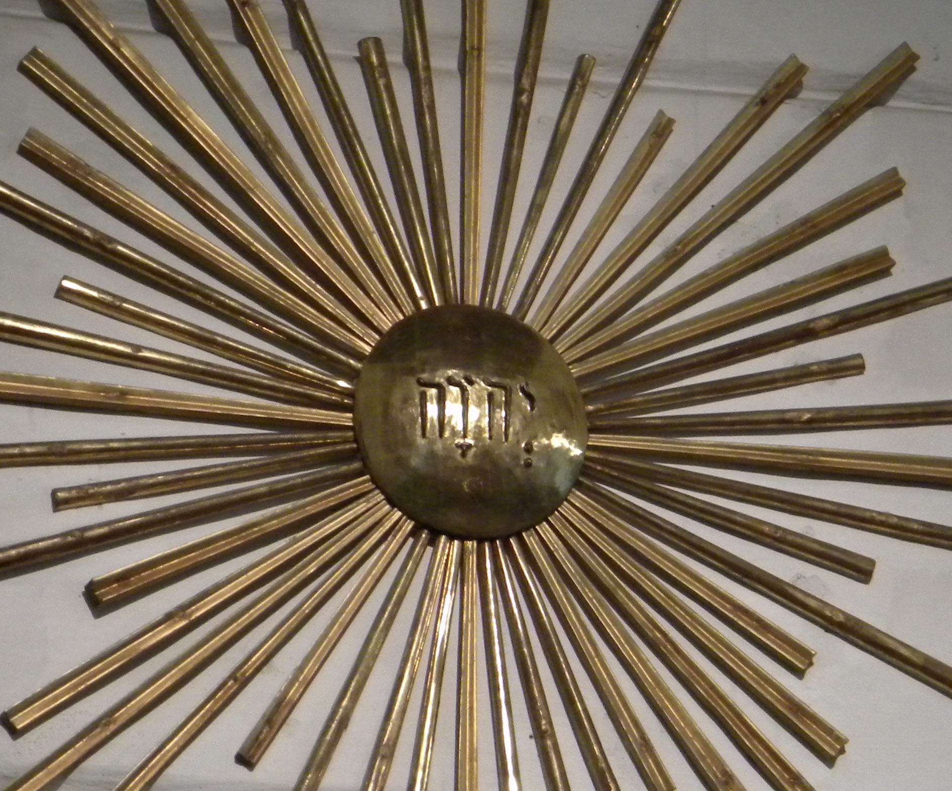 Gudsnamnet JHWH på väggen bakom predikstolen i Alla Helgona kyrka, Nyköping